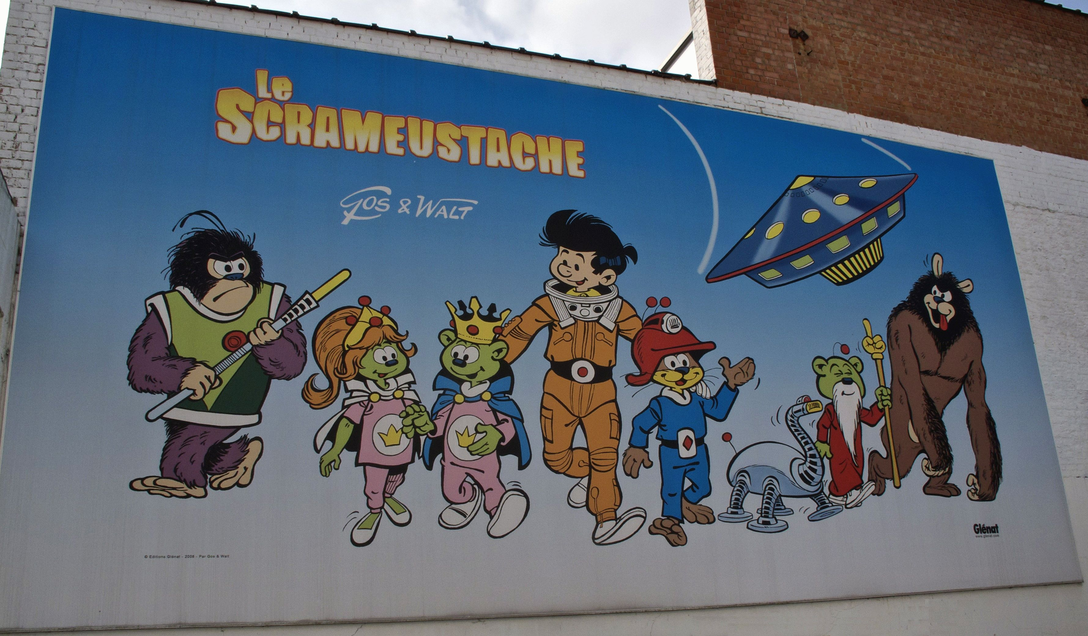 Stripmuur De Katamarom te Oudergem